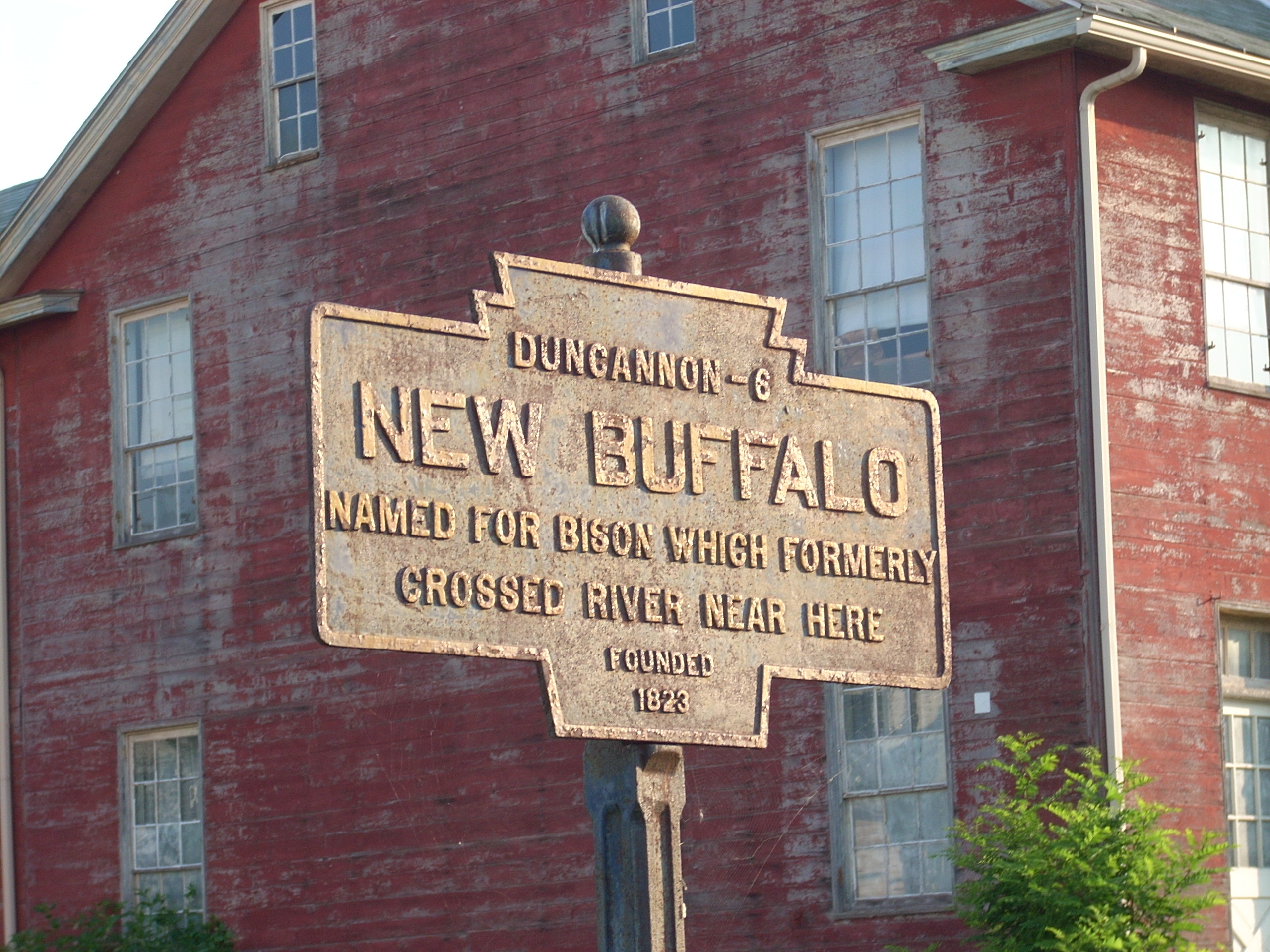 Keystone Marker for New Buffalo, Pennsylvania